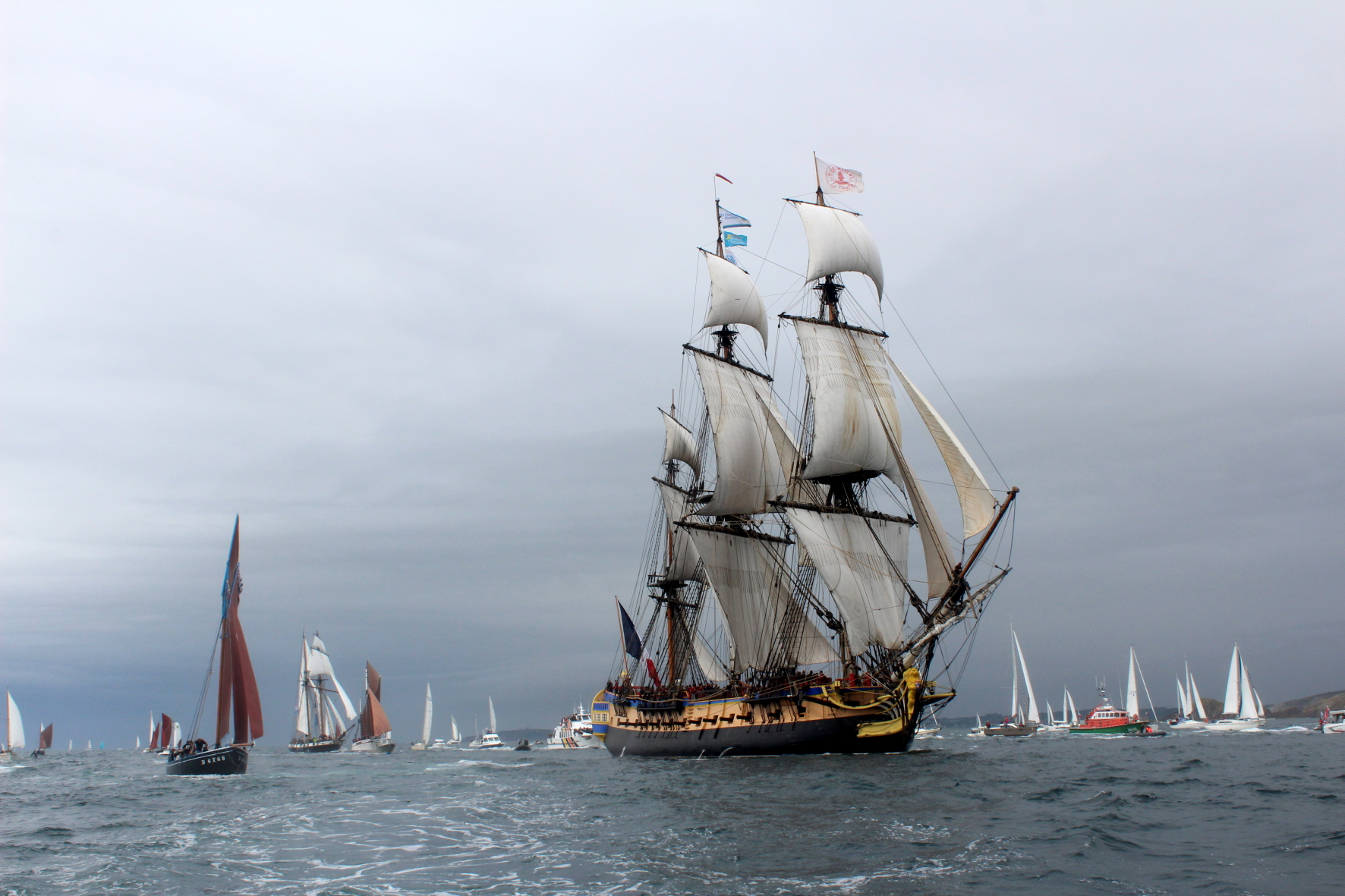 Arrivée de l'Hermione à Brest après sa traversée de l'Atlantique Nord depuis Saint Pierre et Miquelon, accompagnée par les bateaux du patrimoine de la rade.